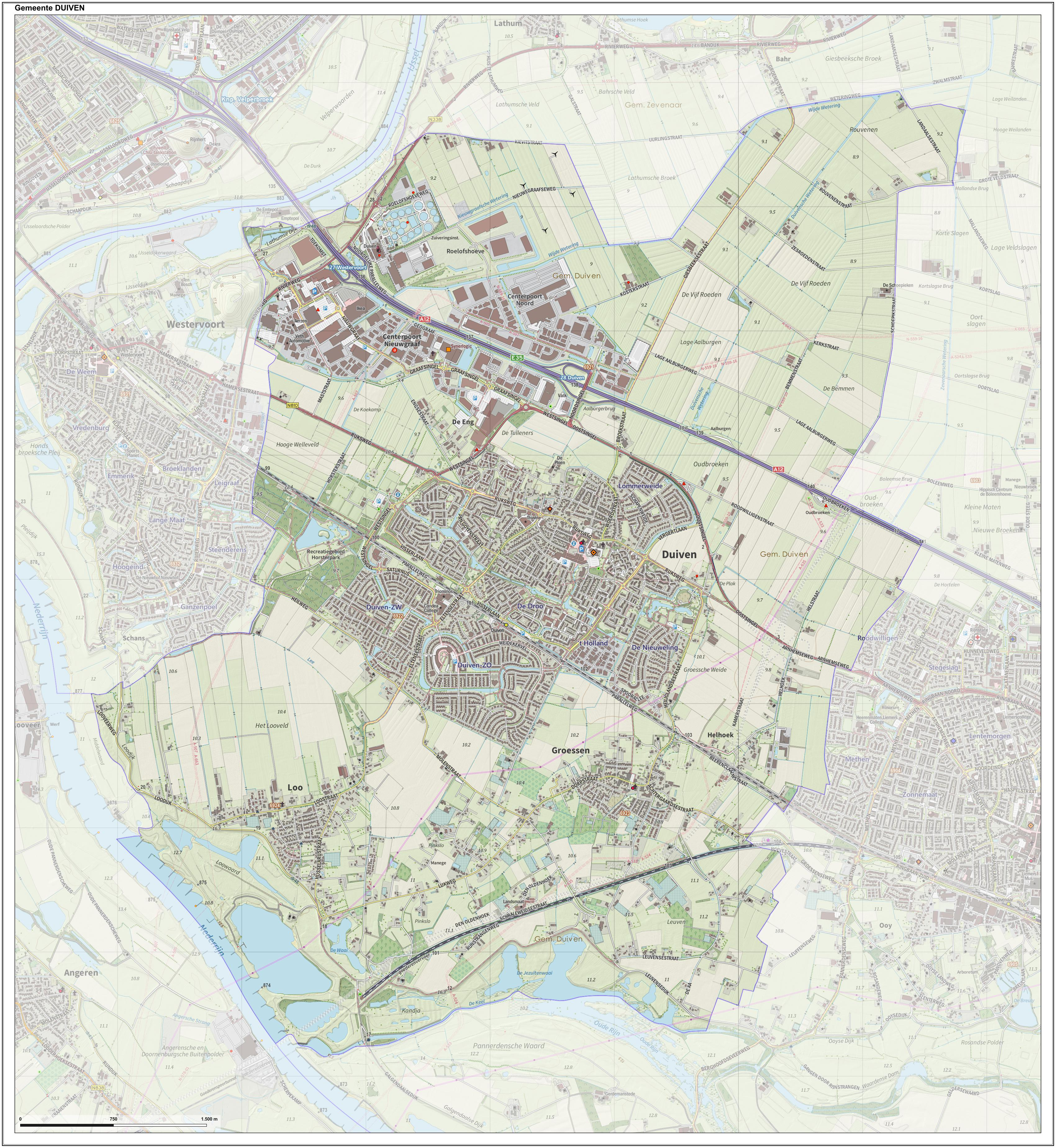 Topografische gemeentekaart. Resolutie: 400 pixels/km. Kaartbeeld samengesteld uit de open geodata van de Top10NL en Top25namen (Kadaster), Creative Commons-BY licentie. Gebouwvlakken uit open geodata BAG extract. Wegen uit de OpenStreetMap, OpenStreetMap community. Reliëfschaduw uit de Actuele Hoogtekaart AHN2. Samenstelling en kleurenschema: Jan-Willem van Aalst, met QGIS. Zie ook de Legenda.